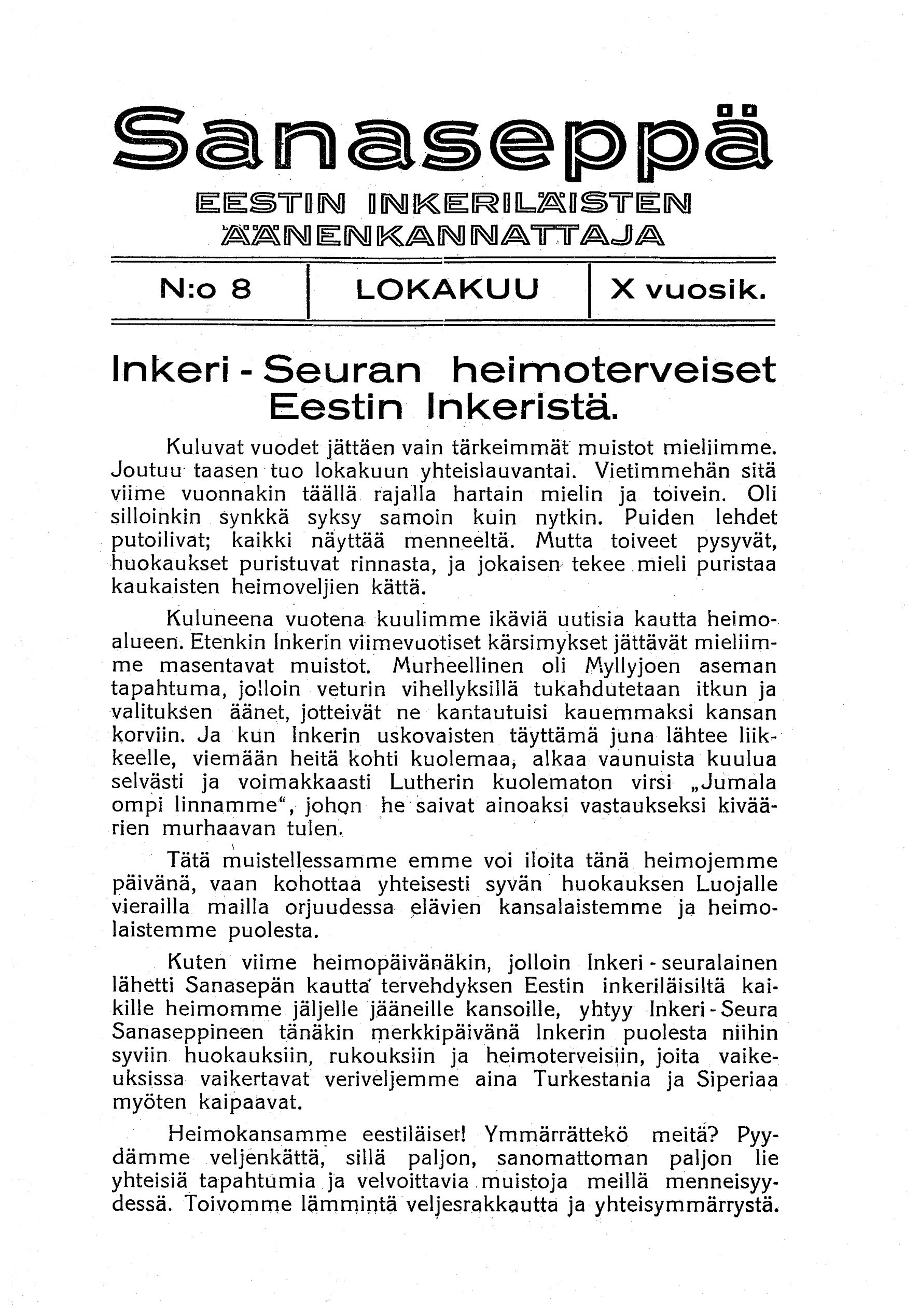 Газета Sanaseppä, издававшаяся в Эстонской Ингерманландии с 1927 по 1938 г.